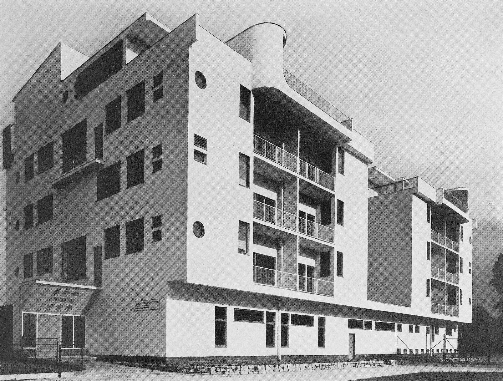 Dom projektu Adolfa Radinga od północnego zachodu. Źródło